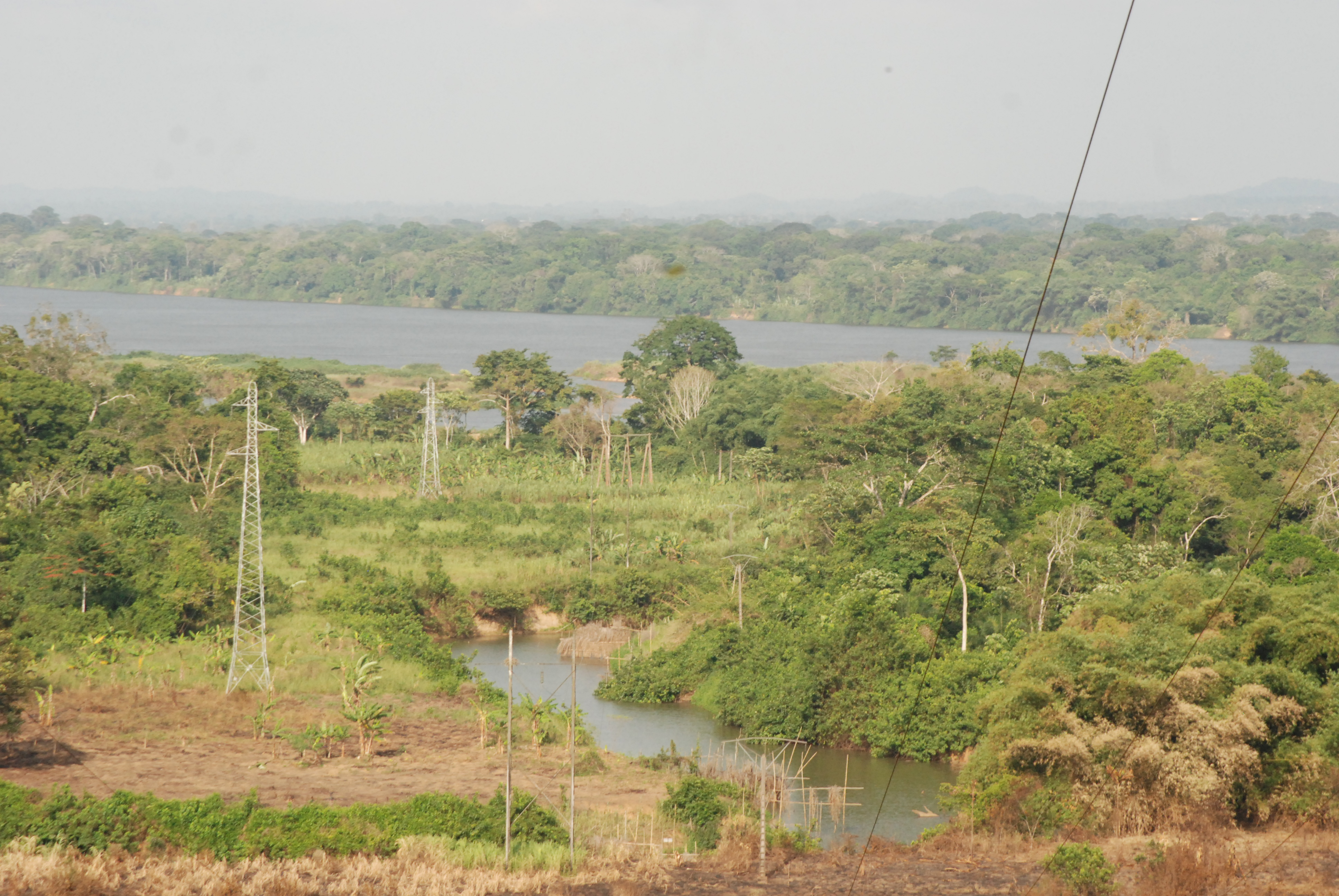 Les alentours du fleuve Sanaga à Edea dans la région du Littoral